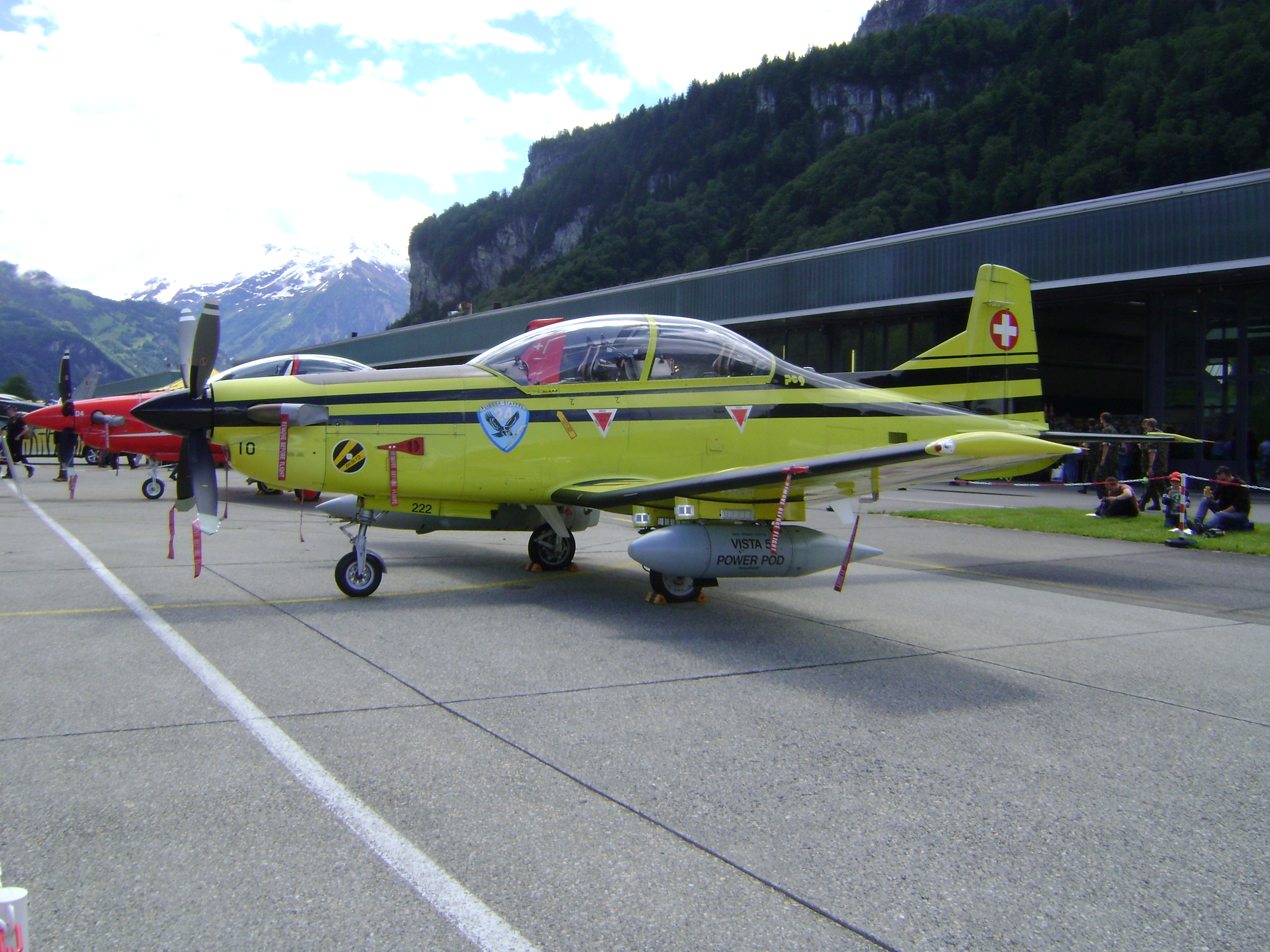 PC-9 Meiringen